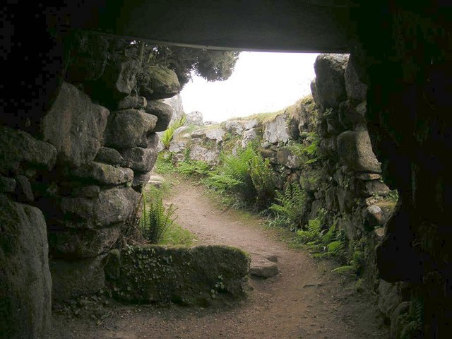 Carn Euny ancient village